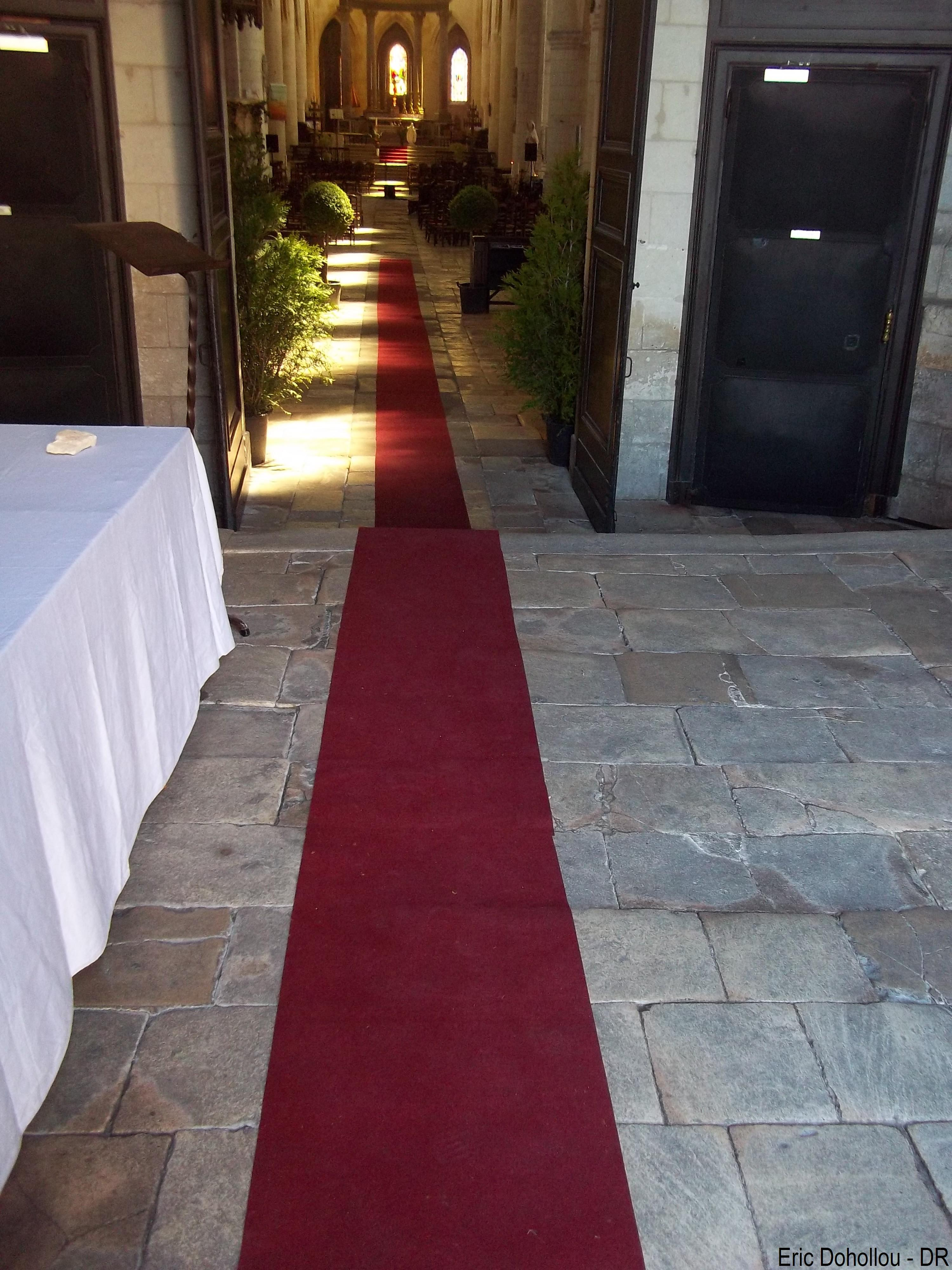 Tambour de la Cathédrale St Pierre de Saintes